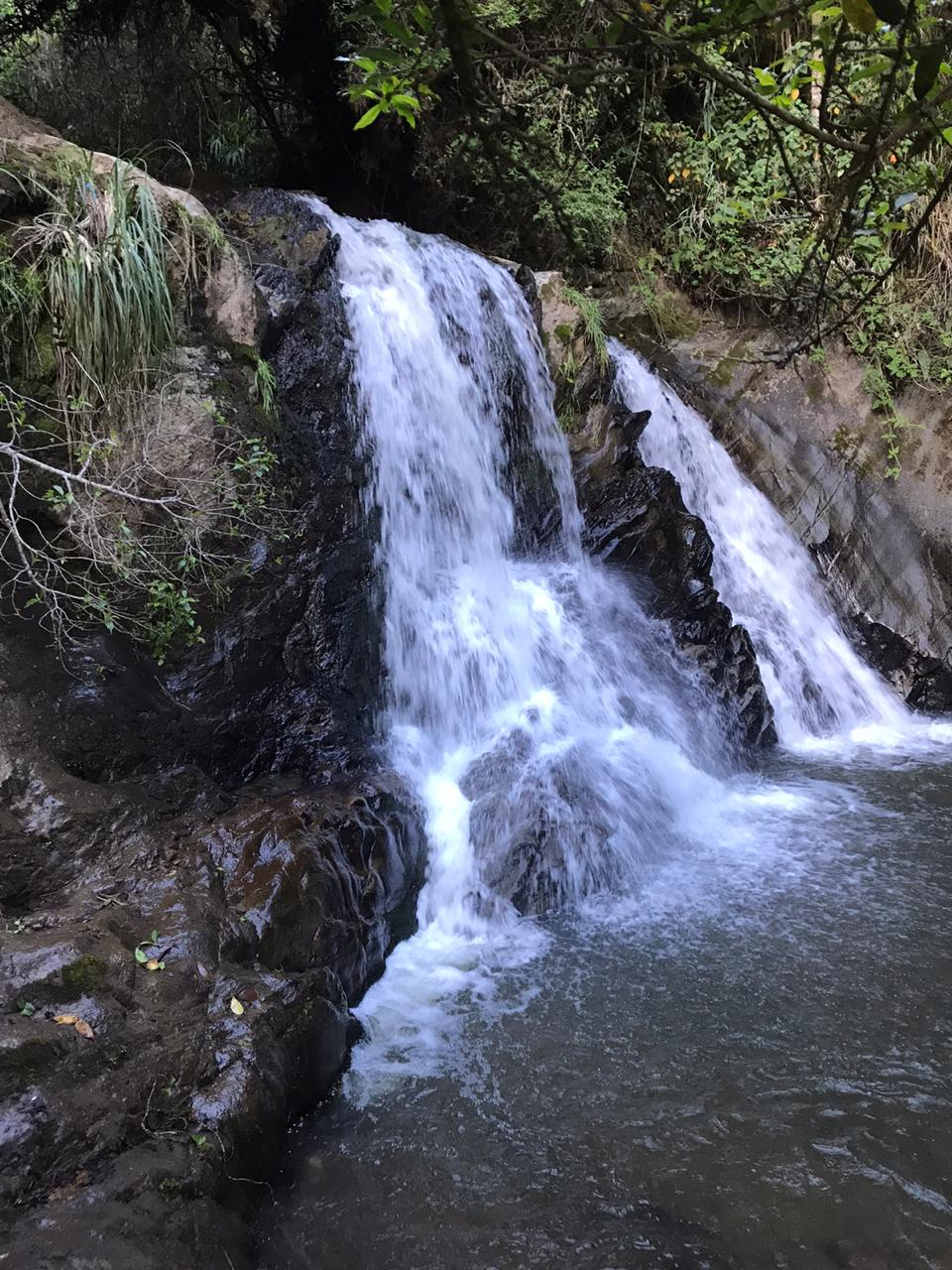 Esta cascada denominada "Canoita" es una atracción turística en el cantón Chordeleg